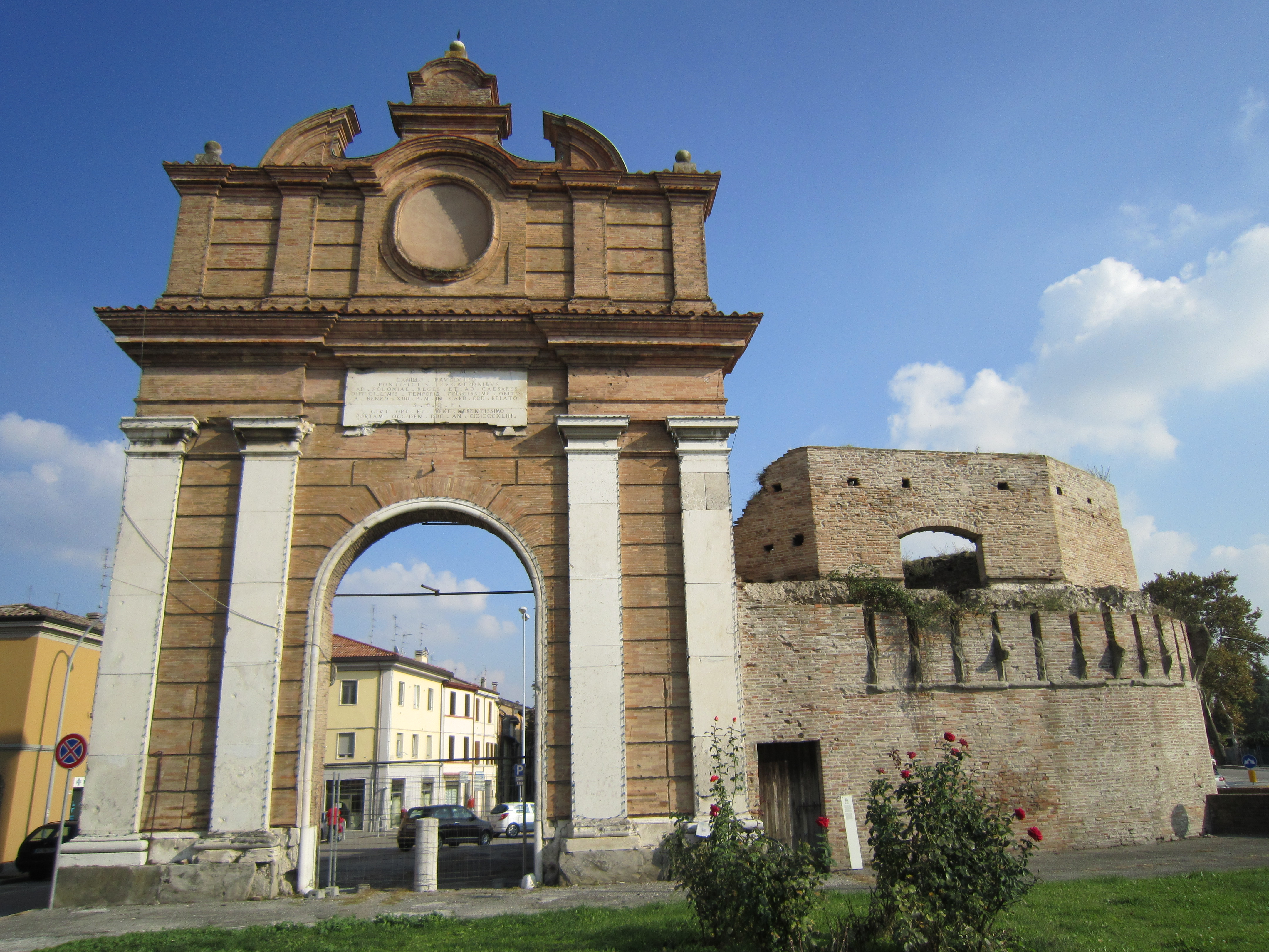 Porta Schiavonia, Forlì, foto propria